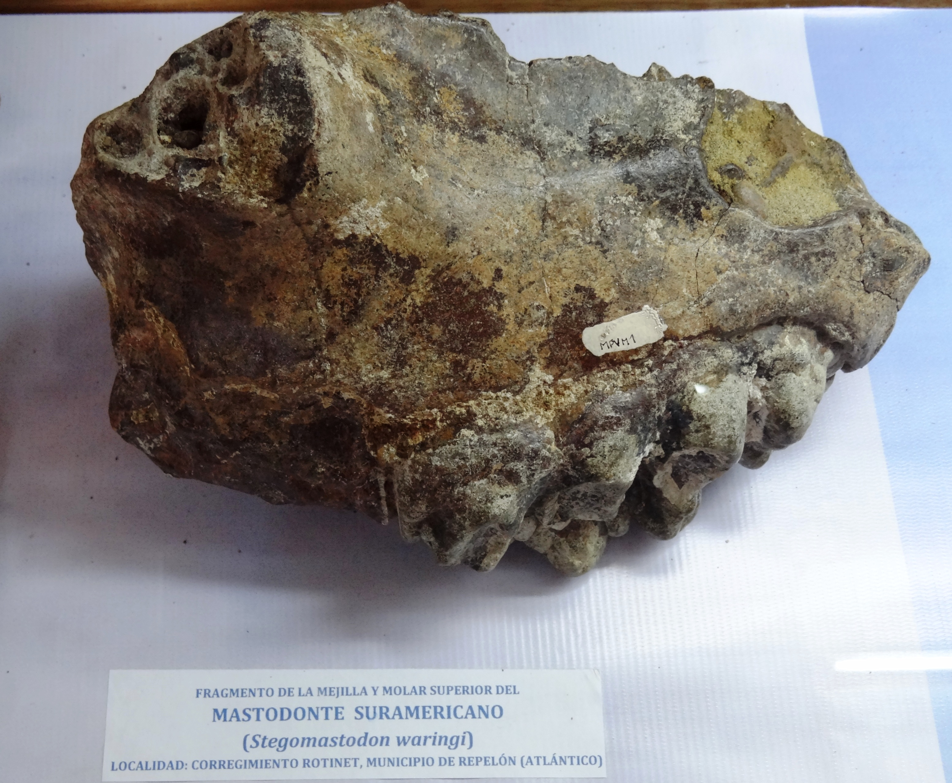 Fragmento de maxilar superior del mastodonte suramericano (Stegomastodon waringi), exhibido en el Museo Paleontológico de Villa de Leyva.